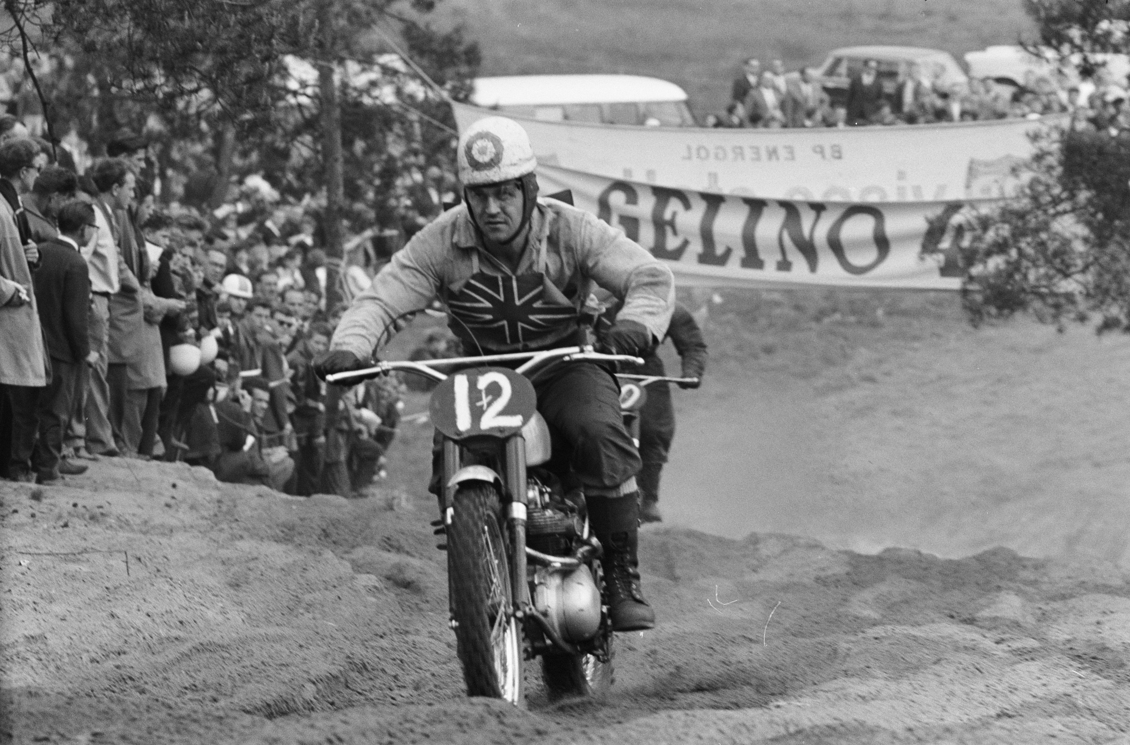 Collectie / Archief : Fotocollectie Anefo Reportage / Serie : [ onbekend ] Beschrijving : Motorcros 1962 De Zandberg te Bergharen Jeff Smith (19) Datum : 3 juni 1962 Locatie : Bergharen Trefwoorden : MOTORCROSS Fotograaf : Pot, Harry / Anefo Auteursrechthebbende : Nationaal Archief Materiaalsoort : Negatief (zwart/wit) Nummer archiefinventaris : bekijk toegang 2.24.01.05 Bestanddeelnummer : 913-9881